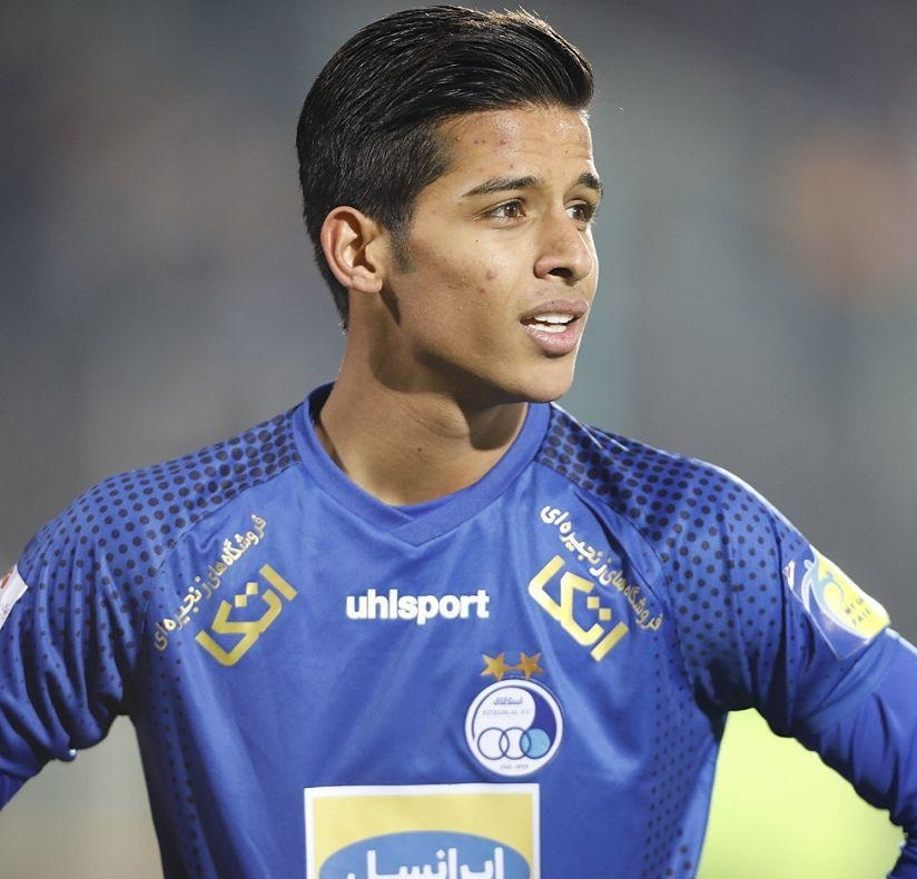 تیم فوتبال استقلال در دیدار هفته پانزدهم رقابت‌های لیگ برتر از ساعت ۱۷:۳۰ شنبه، ۲۳ آذر ۱۳۹۸ در ورزشگاه آزادی میزبان شاهین شهرداری بوشهر بود و با نتیجه ۴ بر یک به برتری رسید. گل‌های استقلال را در این بازی آرش رضاوند (۲۹)، مهدی قائدی (۵۲)، محمد دانشگر (۵۸) و شیخ دیاباته (۶۹) به ثمر رساندند و روزبه چشمی (۸۸ - گل به خودی) برای شاهین گلزنی کرد. (مشاهده گزارش بازی)